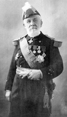 Amiral Marie Benjamin Gaston Jean Merveilleux du Vignaux (1865-1930)